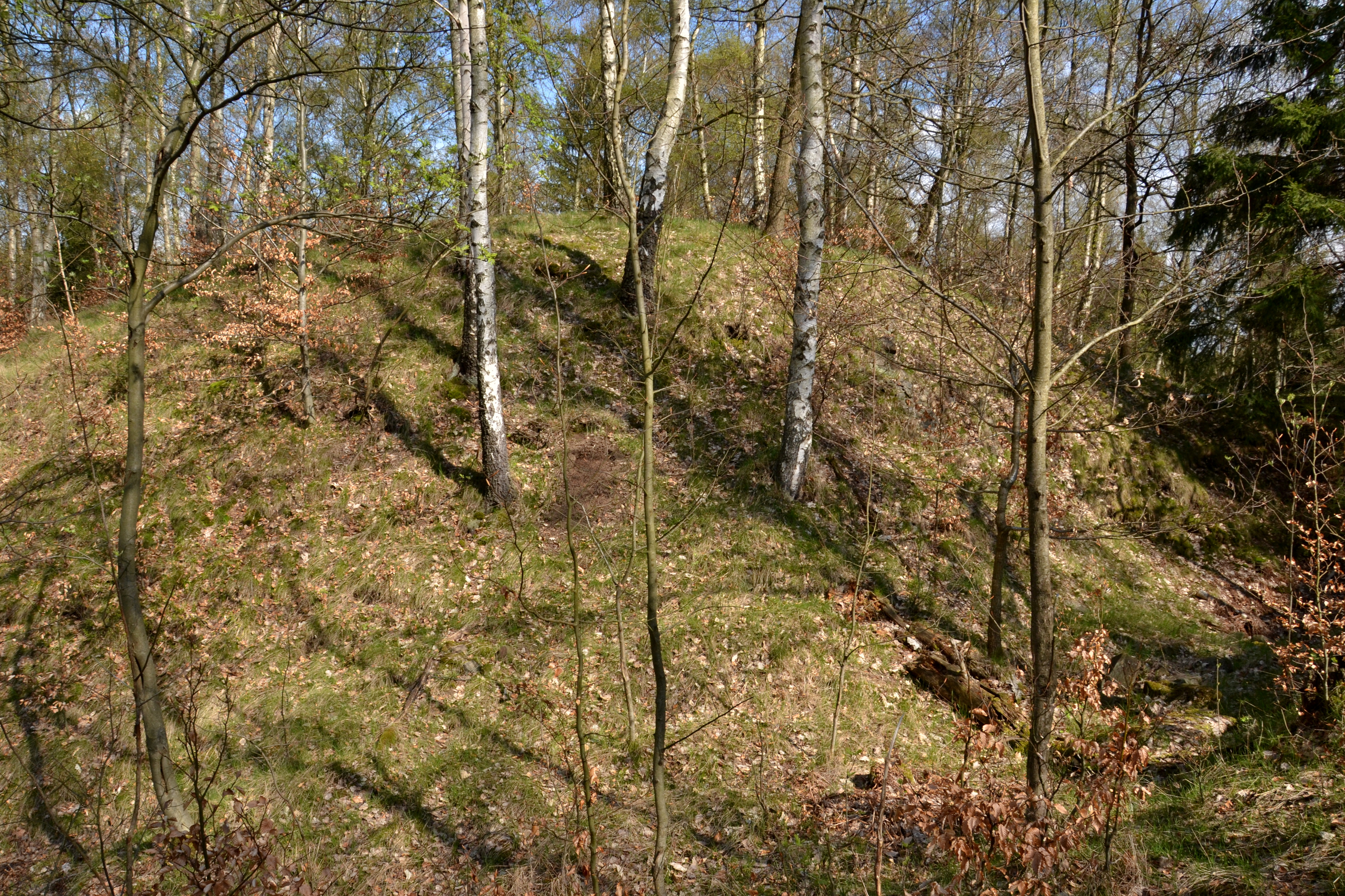 Centrální pahorek od západu